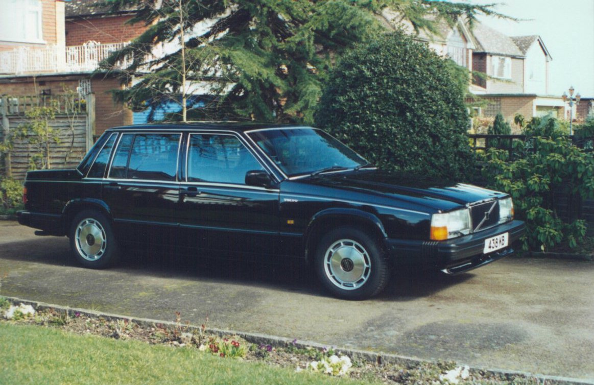 1987 Volvo 740GLE1987 Volvo 740GLE